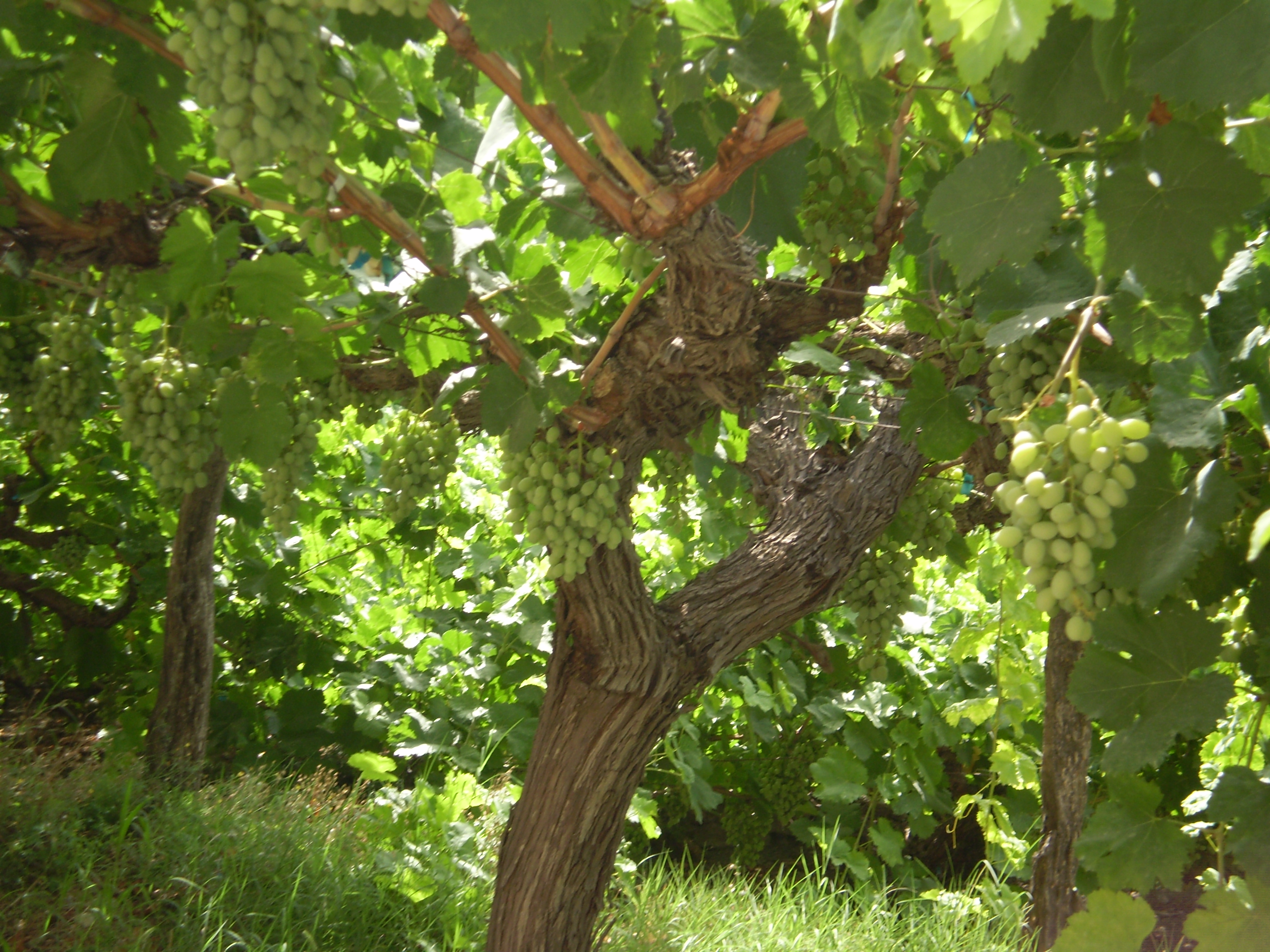 Parras de Uva de Ohanes, de embarque o de Almería de Huecija (Almería - España)